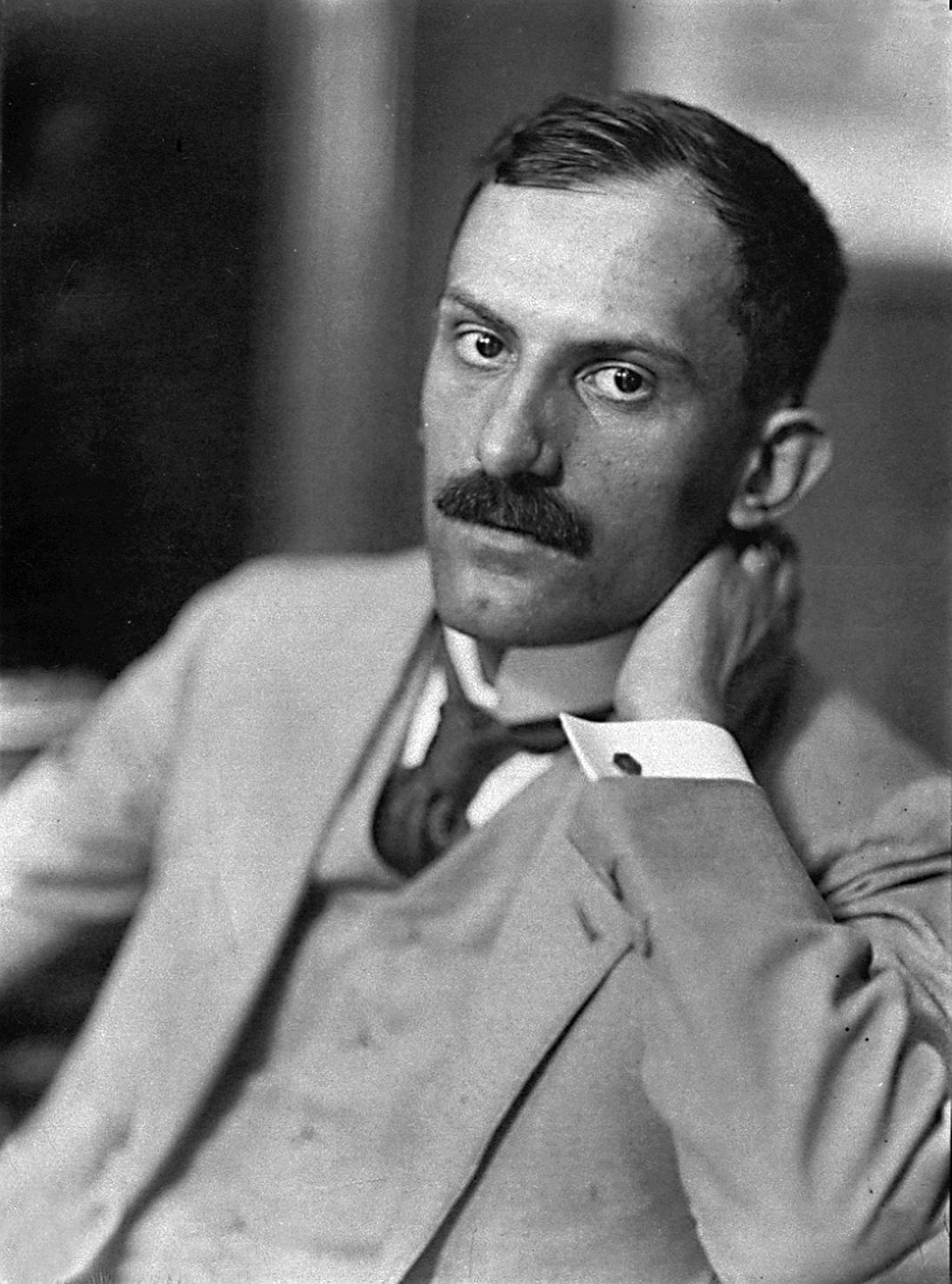 Babits Mihály könyöklős portréja